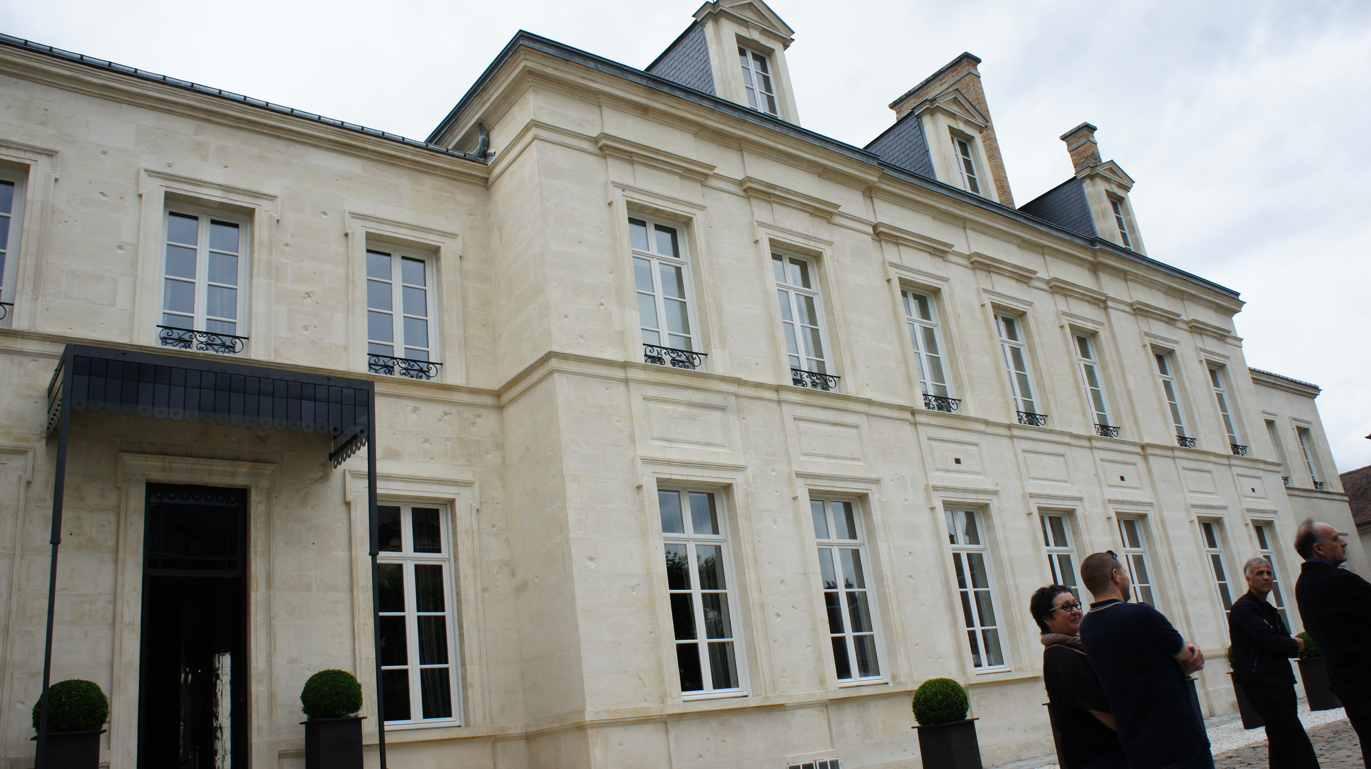 Journées particulières se tenant hôtel du Marc, vue de la façade sud .